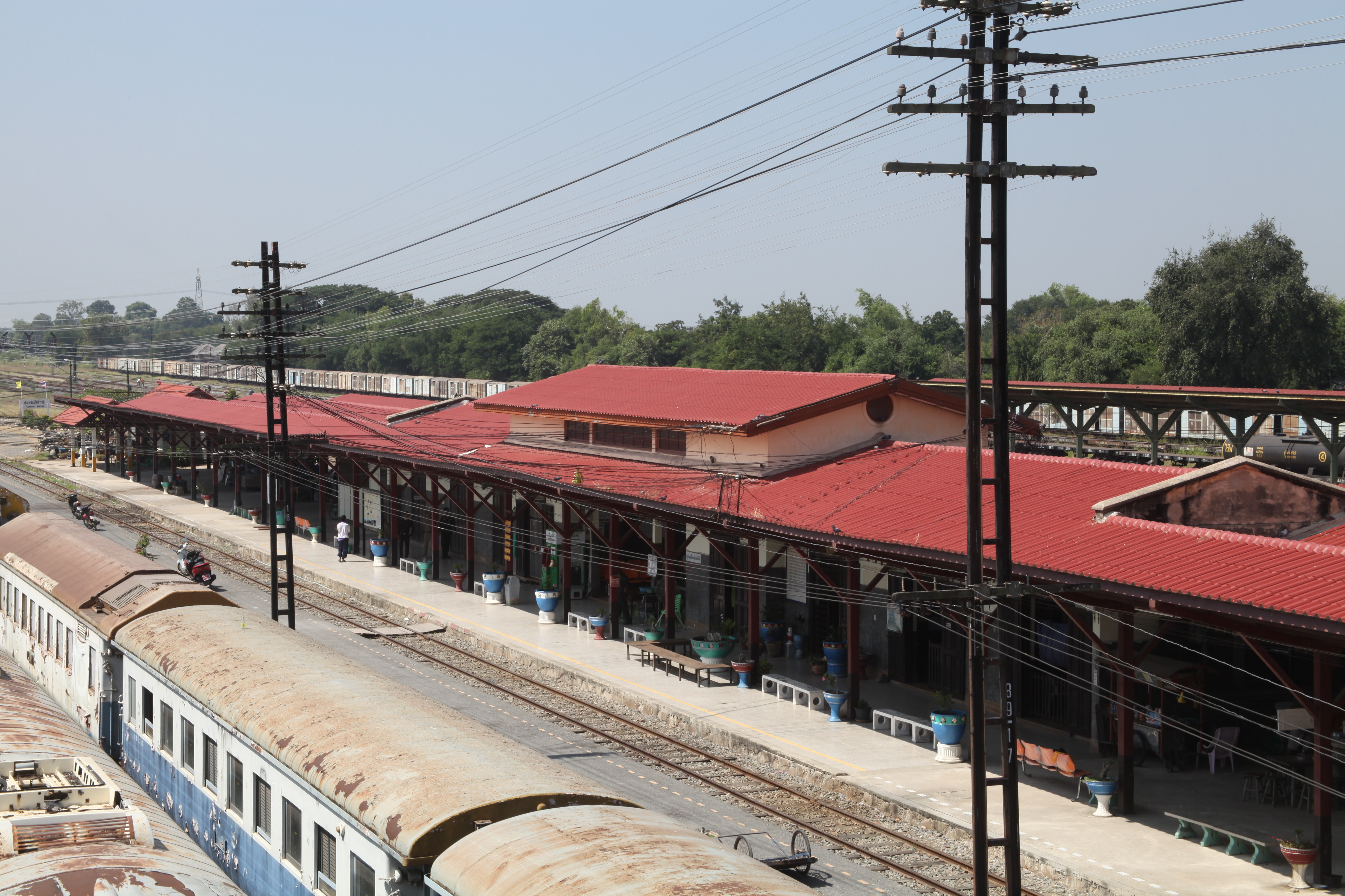 バーンパーチー駅